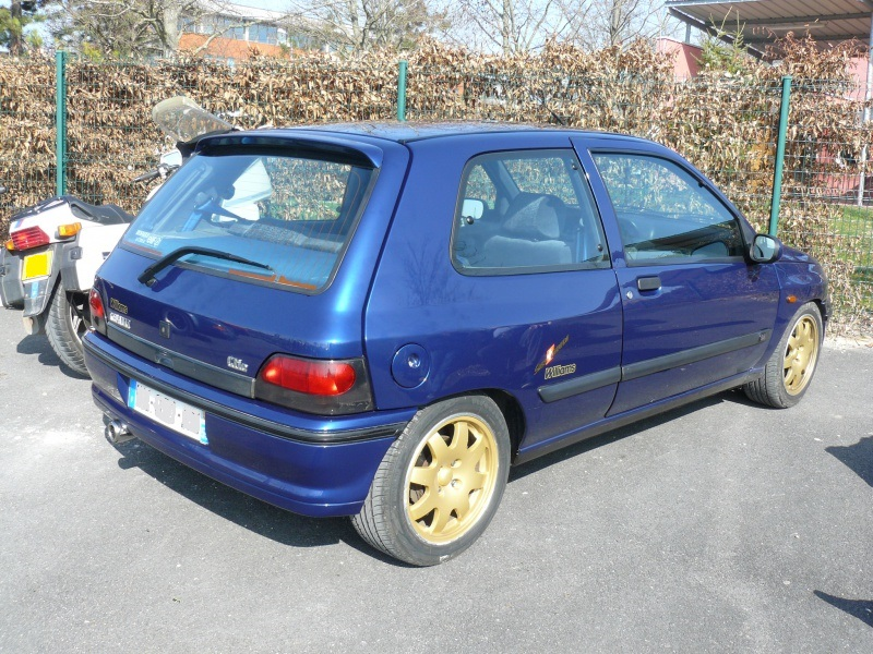 Reims 2014